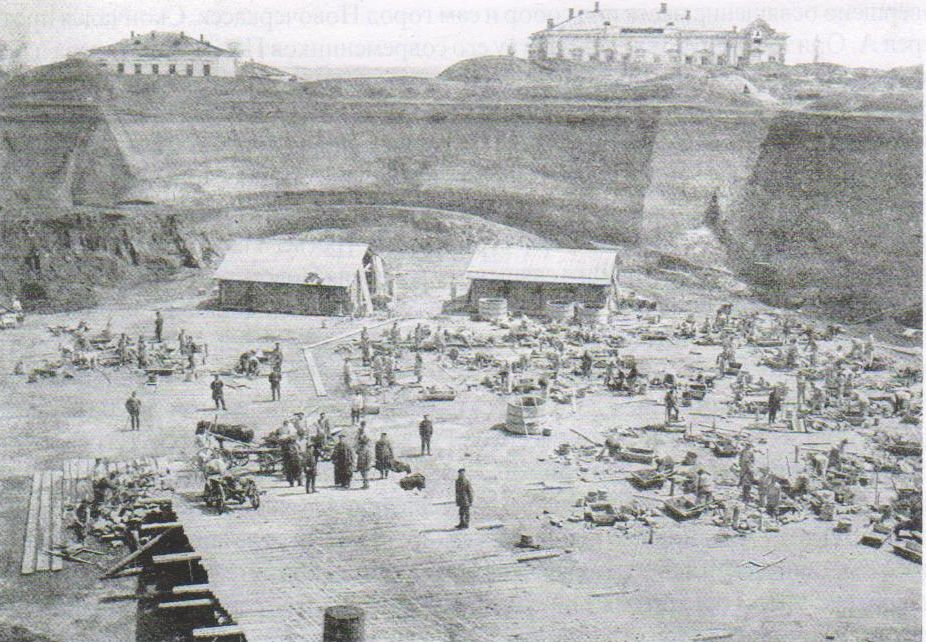 Строящийся Вознесенский собор в Новочеркасске около 1891-1901 года. Кладка фундамента.